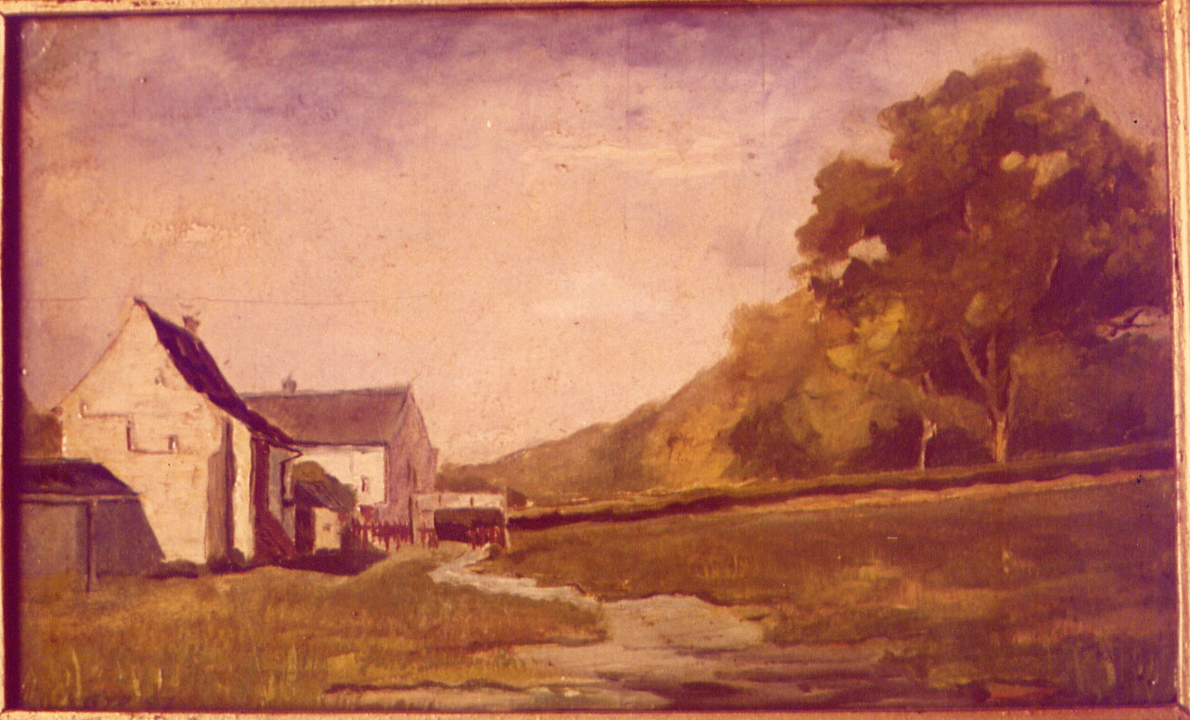 Peinture sur bois de 1897, du prieuré du Rouge Cloître près Bruxelles, (22,5 cm x 13,7 cm), par Gabriel van Dievoet